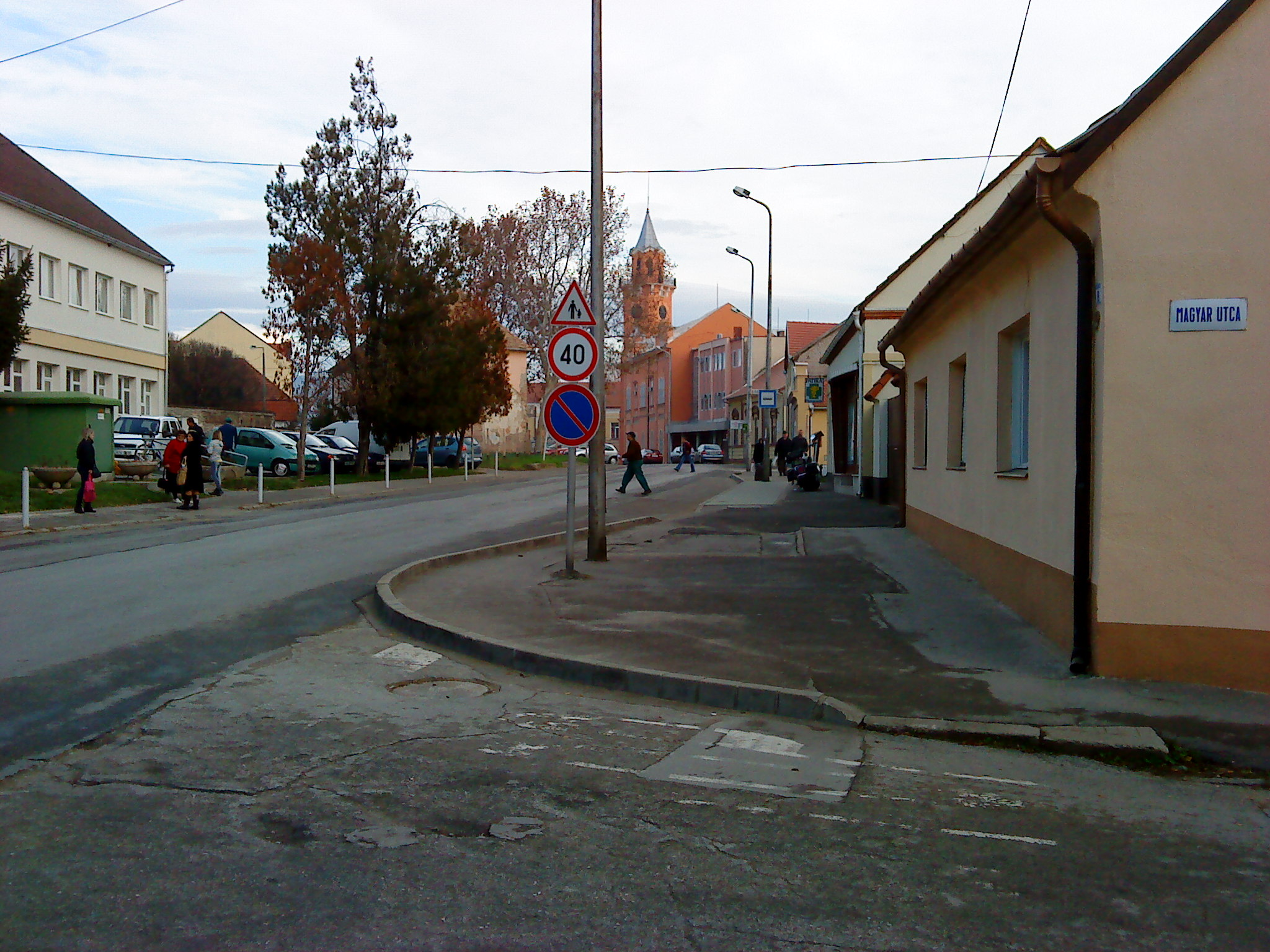 Siklós, Magyar-Baross utca